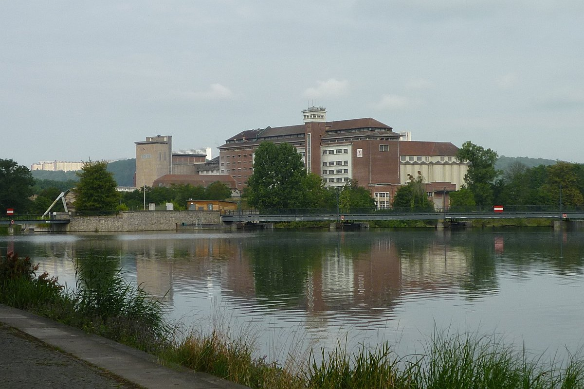 Usine des Grands Moulins à Nancy, France